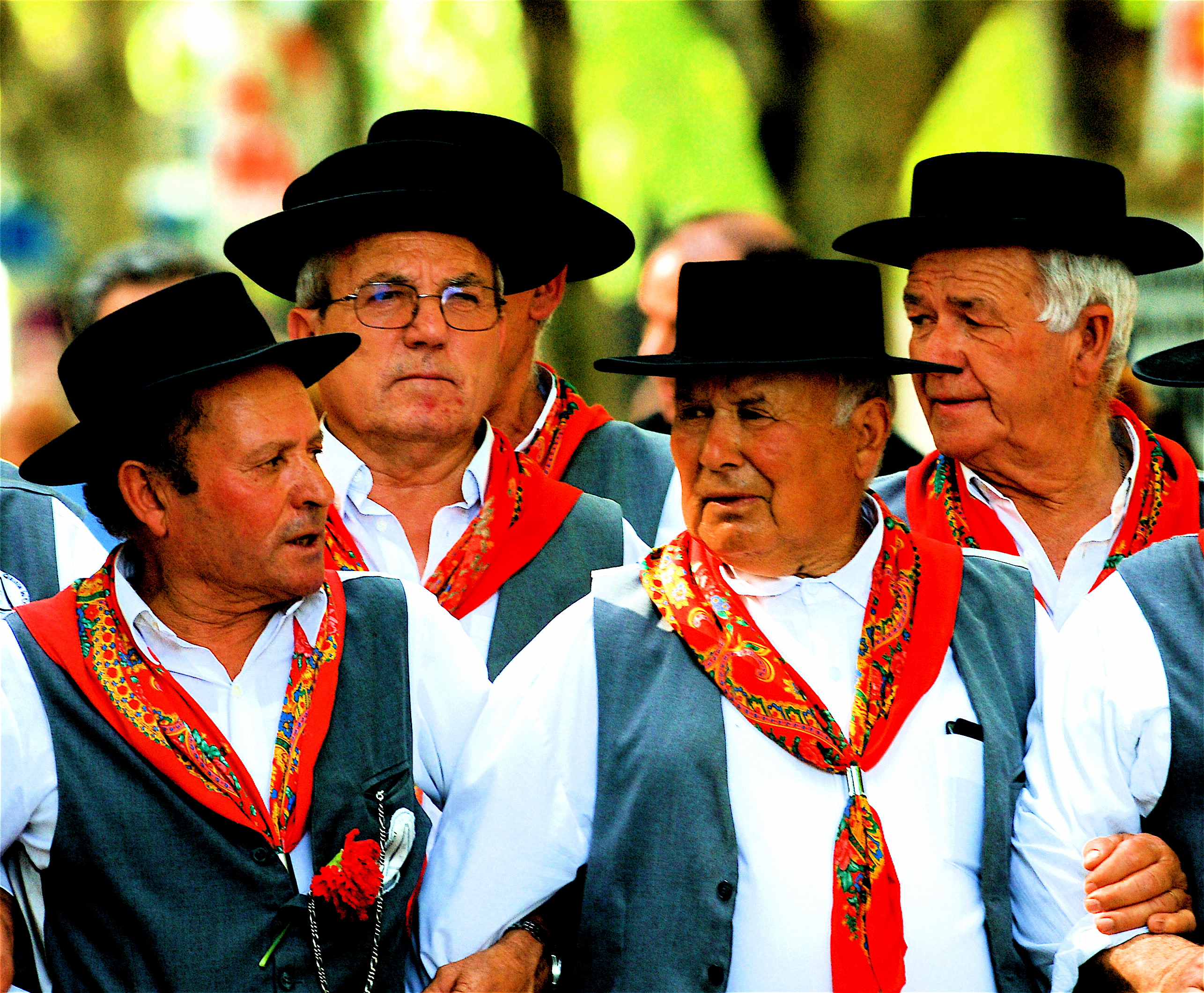 Lisbon, Portugal